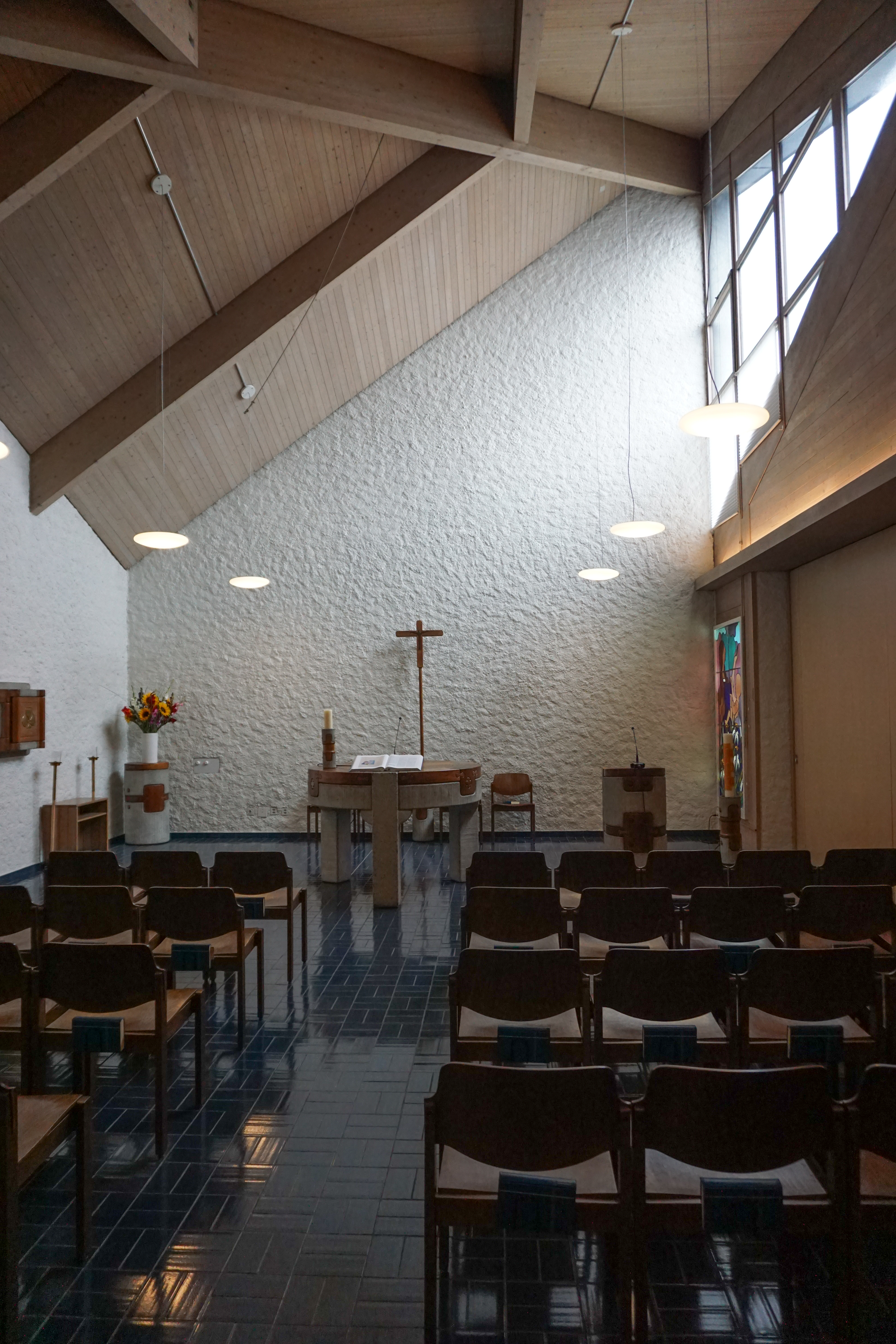 Kirche, Innenraum, erweiterbar.